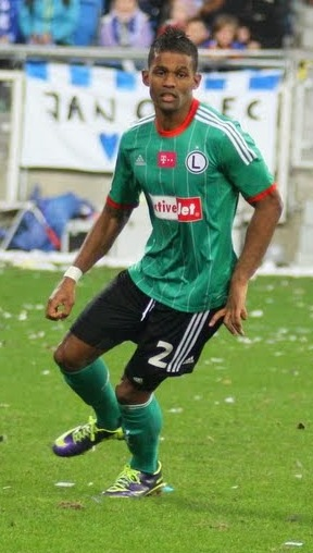 Dossa Junior w barwach Legii Warszawa